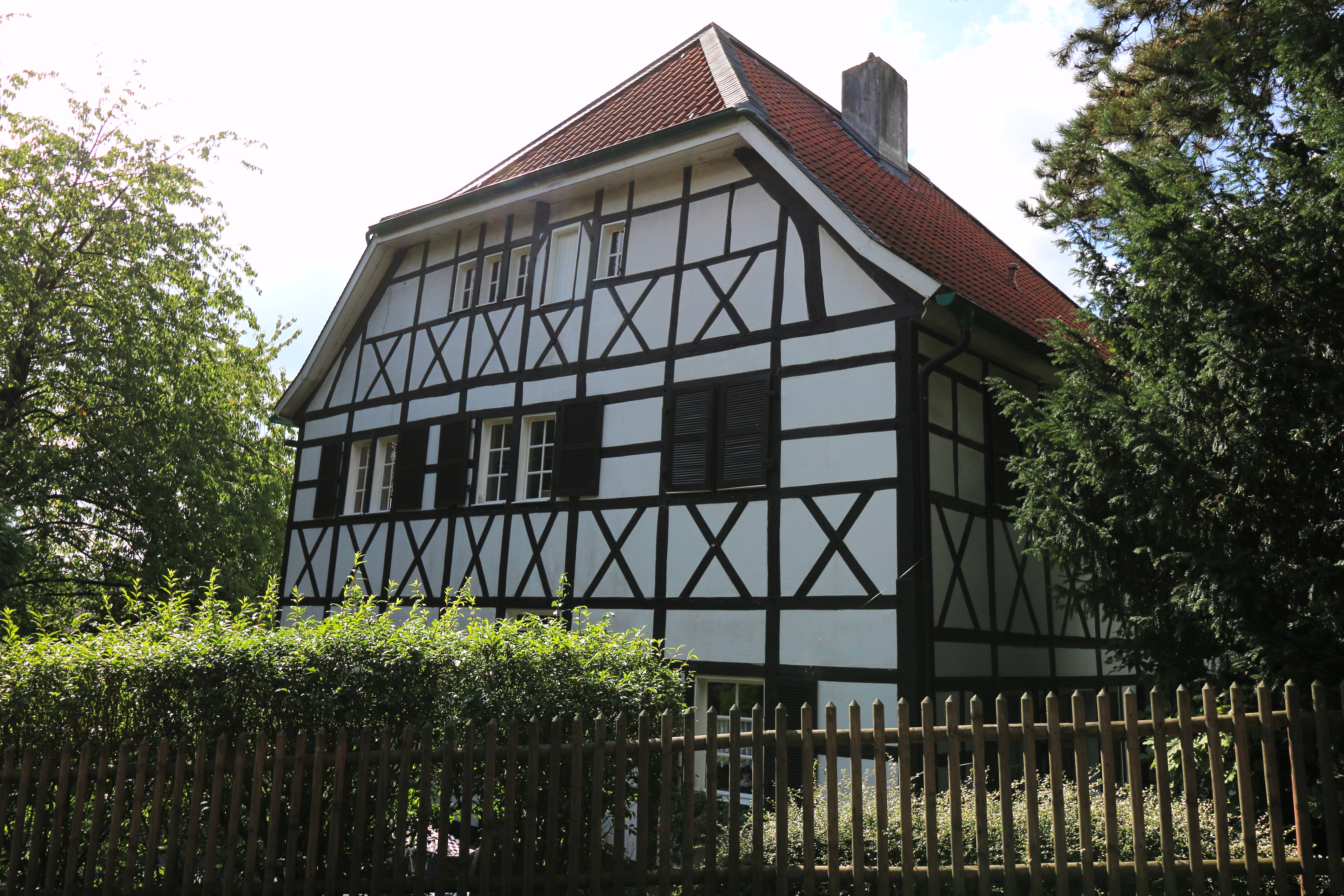 Denkmalgeschütztes Fachwerkhaus in Solingen-Mitte, Alfred-Nobel-Straße 14, mit Zaun und HeckeThis is a photograph of an architectural monument., no. 911